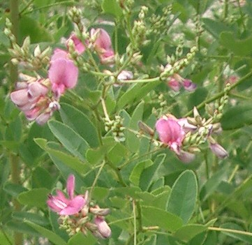 ハギ, Lespedeza, (Bushclover?)